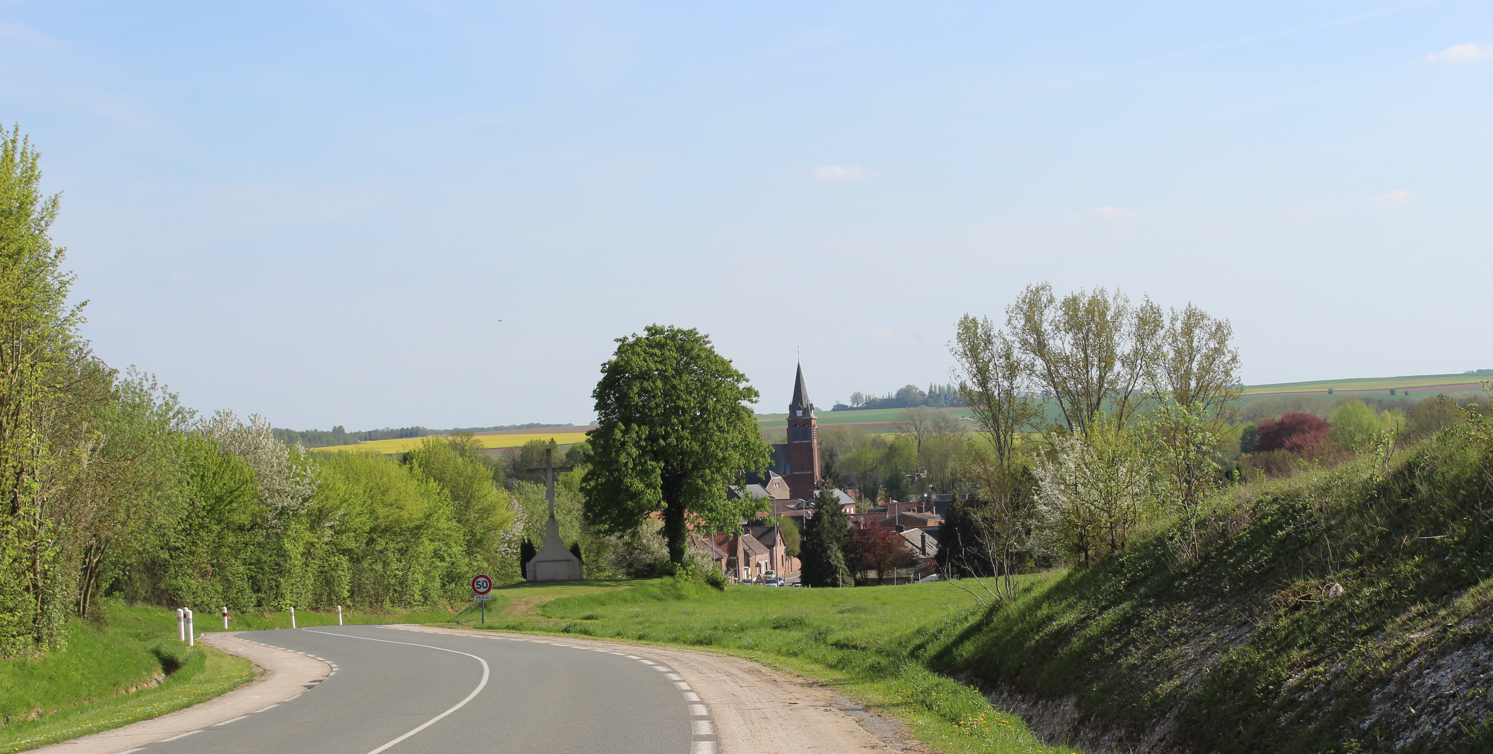 Panorama du village.